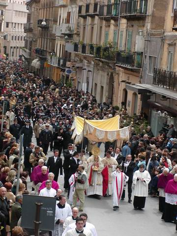 Processione della Real Maestranza a Caltanissetta.